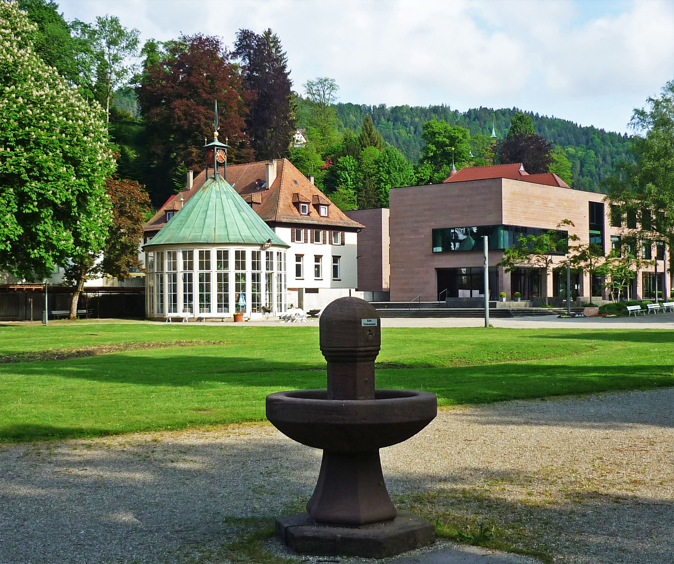 Trinkhalle im Kurpark von Bad Liebenzell im Lkr. Calw (Württemberg)